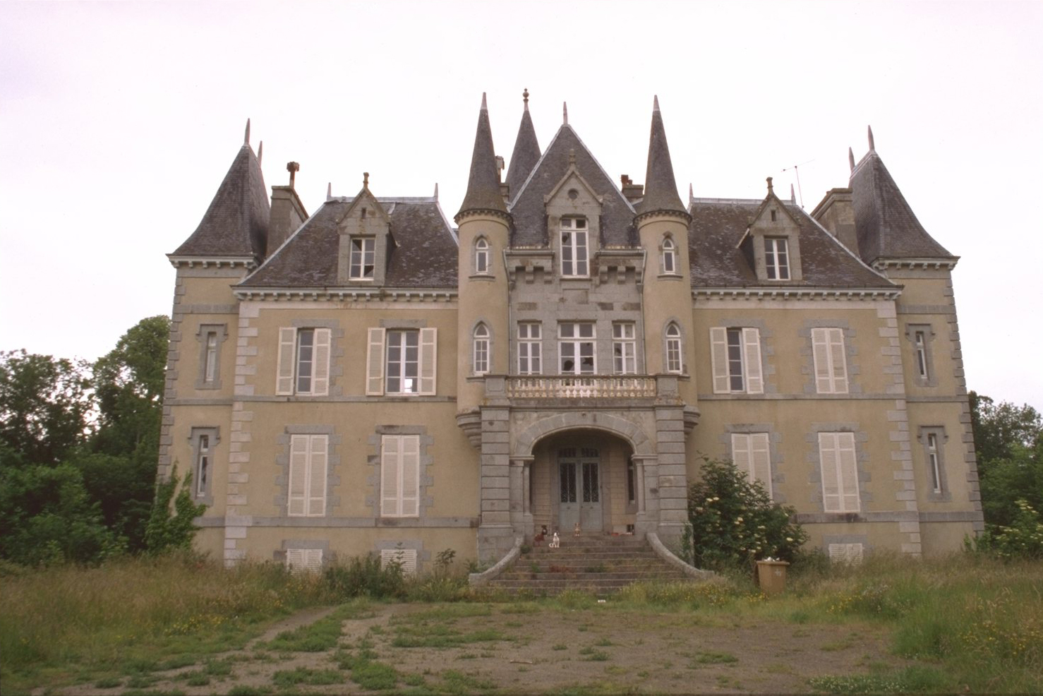 Schloss südwestlich von Hillion, Bretagne, Frankreich